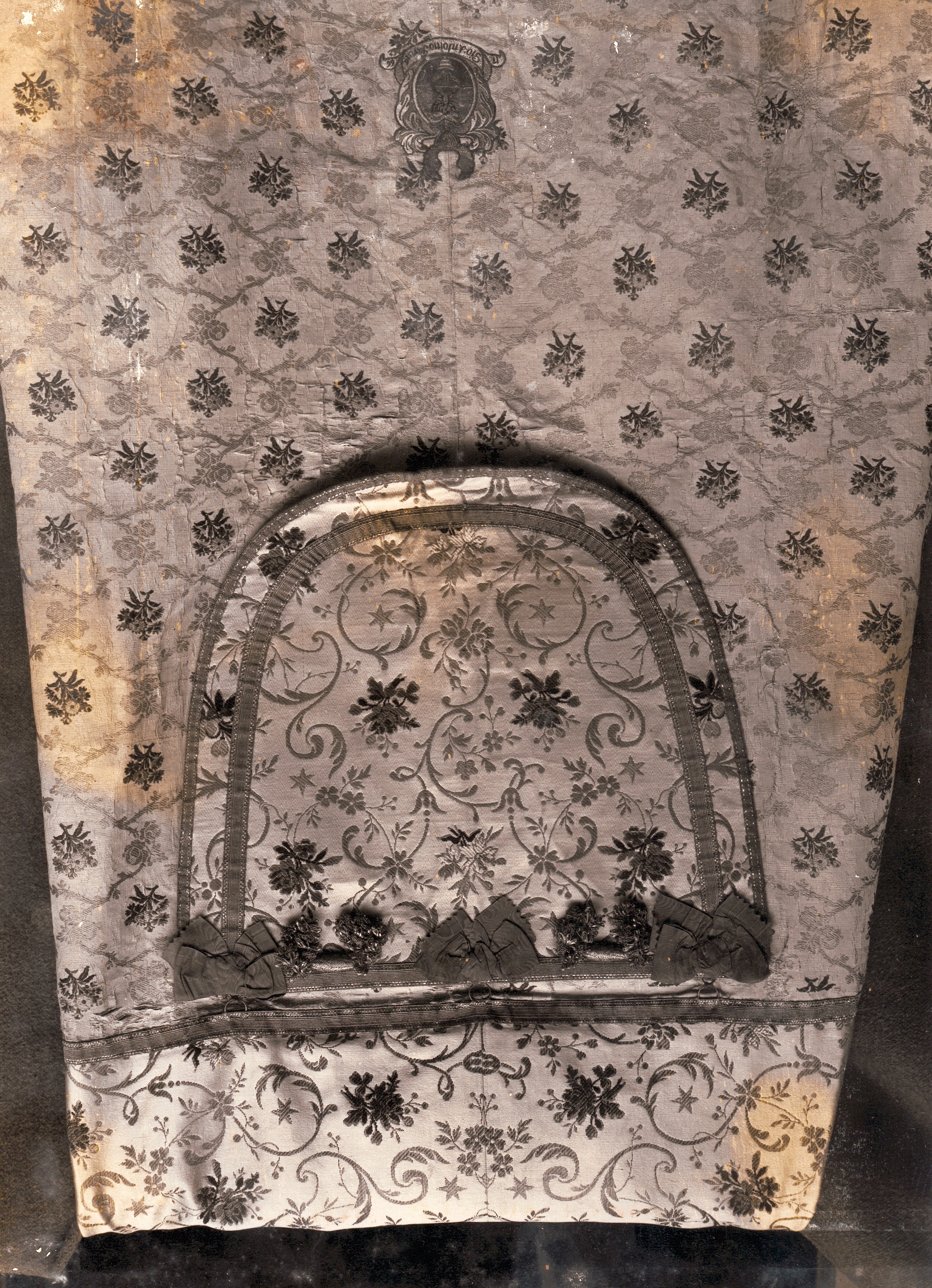 Meßgewand gestiftet von J.A.Farina